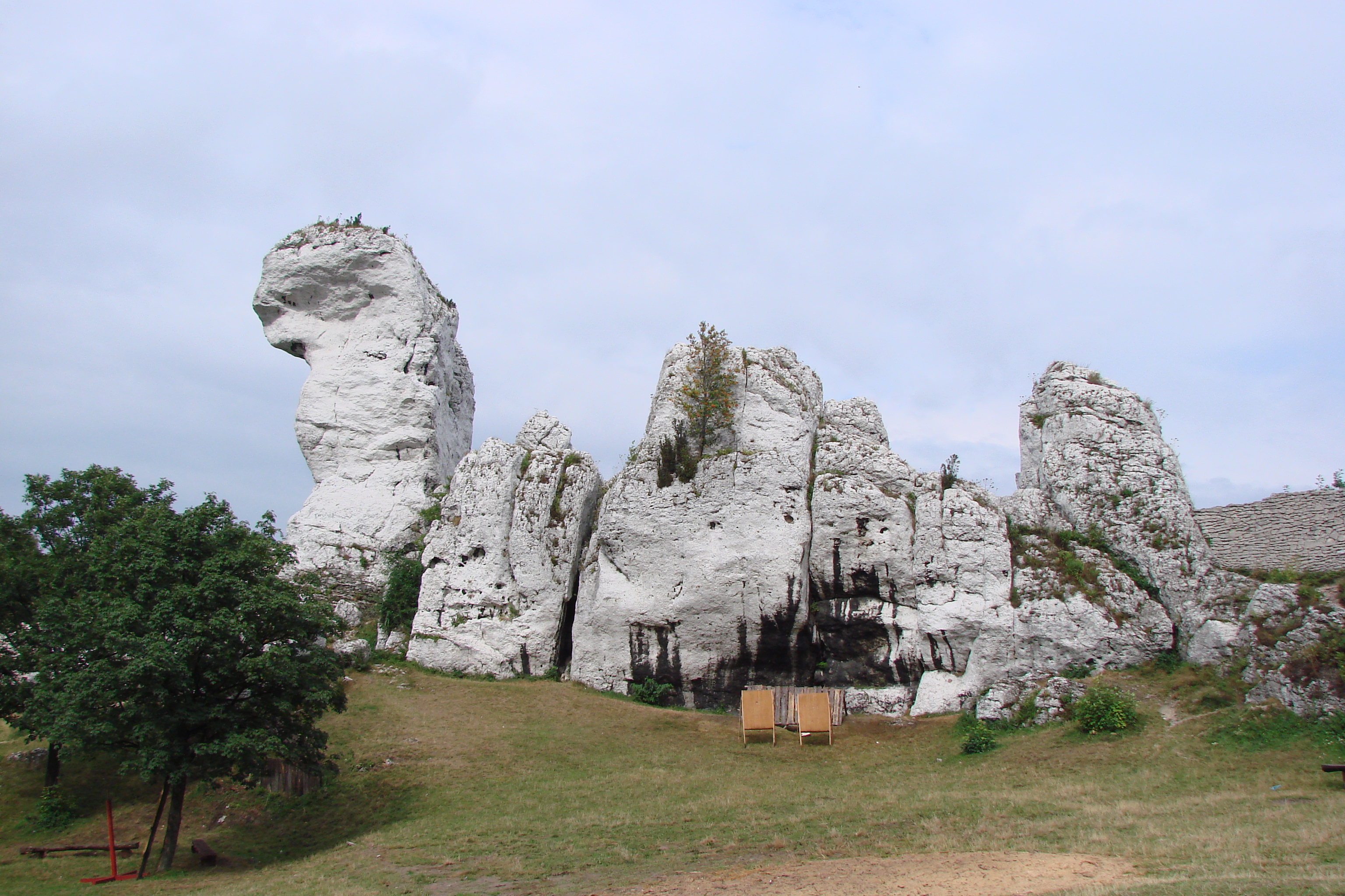 Skała "Wielbłąd" obok zamku w Ogrodzieńcu.